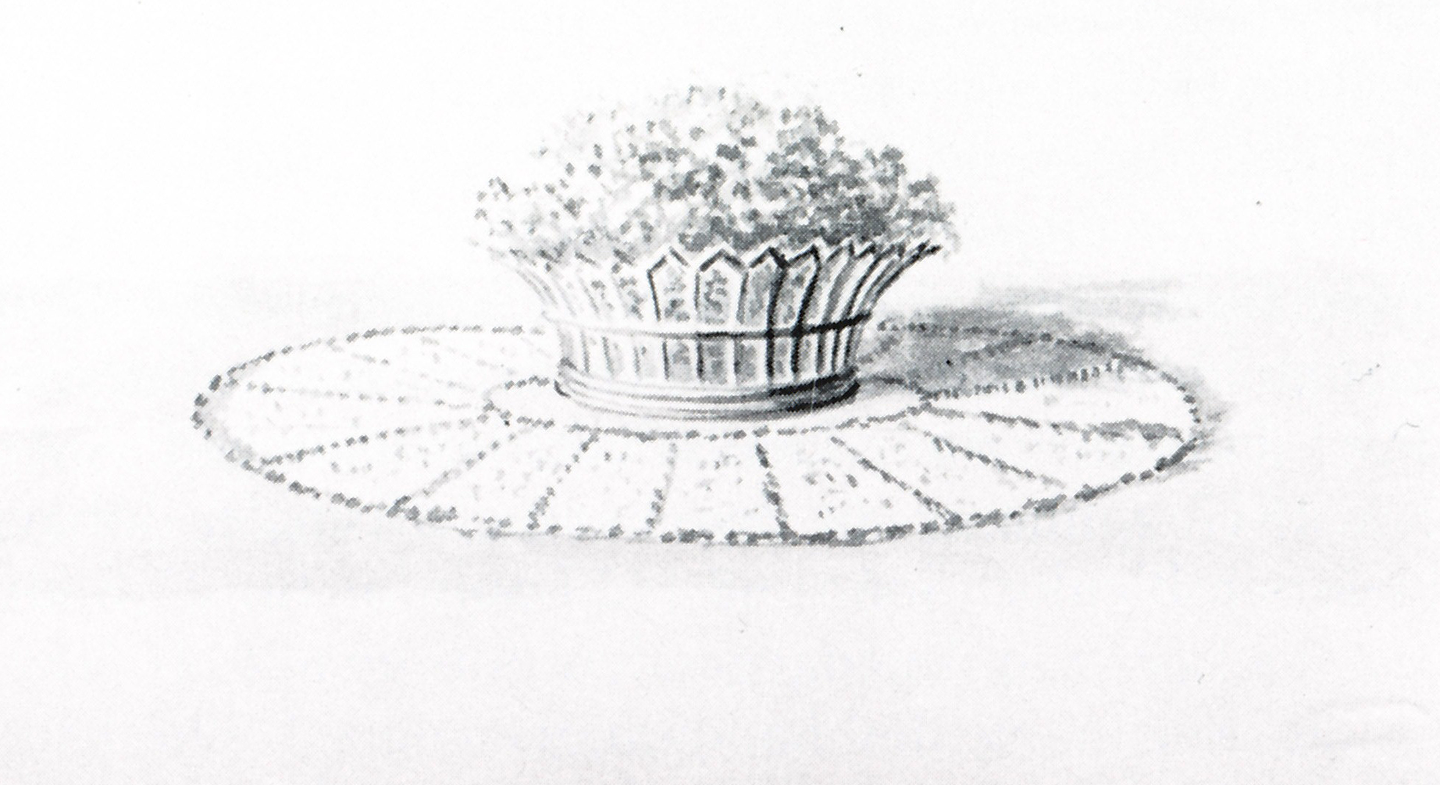 Zeichnung eines "Hardenberg-Basket"